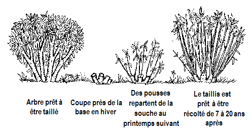 Taillis